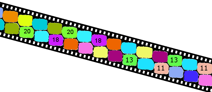 Indeling van filmstrook